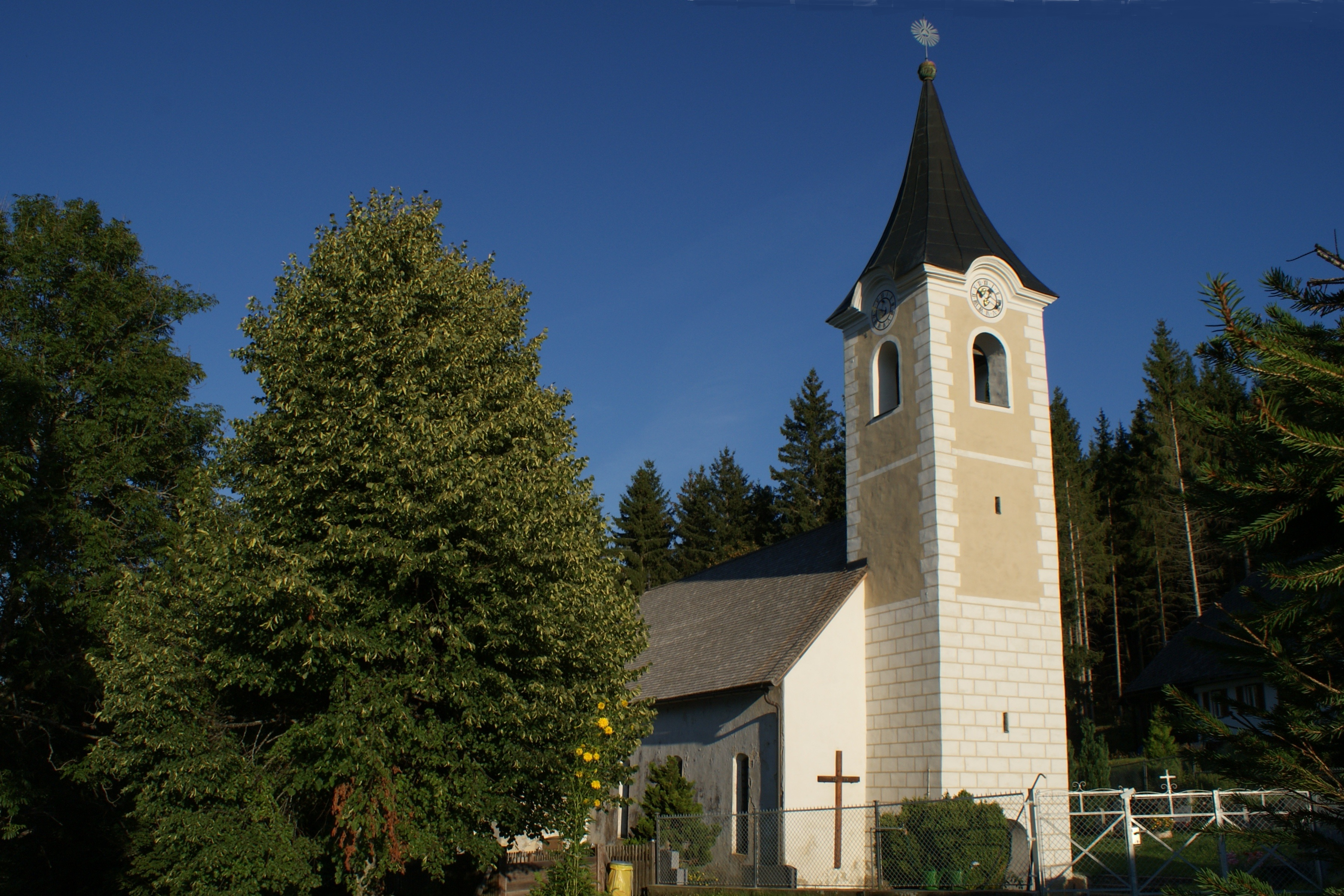 Filialkirche Dobritsch, Guttaring, Kärnten